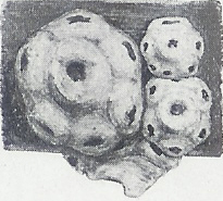 Femmina adulta di Ceroplastes sinensis; Immagine acquisita tramite scansione dal volume di Antonio Berlesi “ Manuale sugli insetti nocivi alle piante coltivate, campestri, orticole ed ai loro prodotti”, II ed. - Firenze, Tipografia di Mariano Ricci, 1924 ; opera non più sottoposta alla normativa in materia di diritto di Autore perché decorsi più di 70 anni dalla sua morte avvenuta in data 24 ottobre 1927. Michele iannizzotto